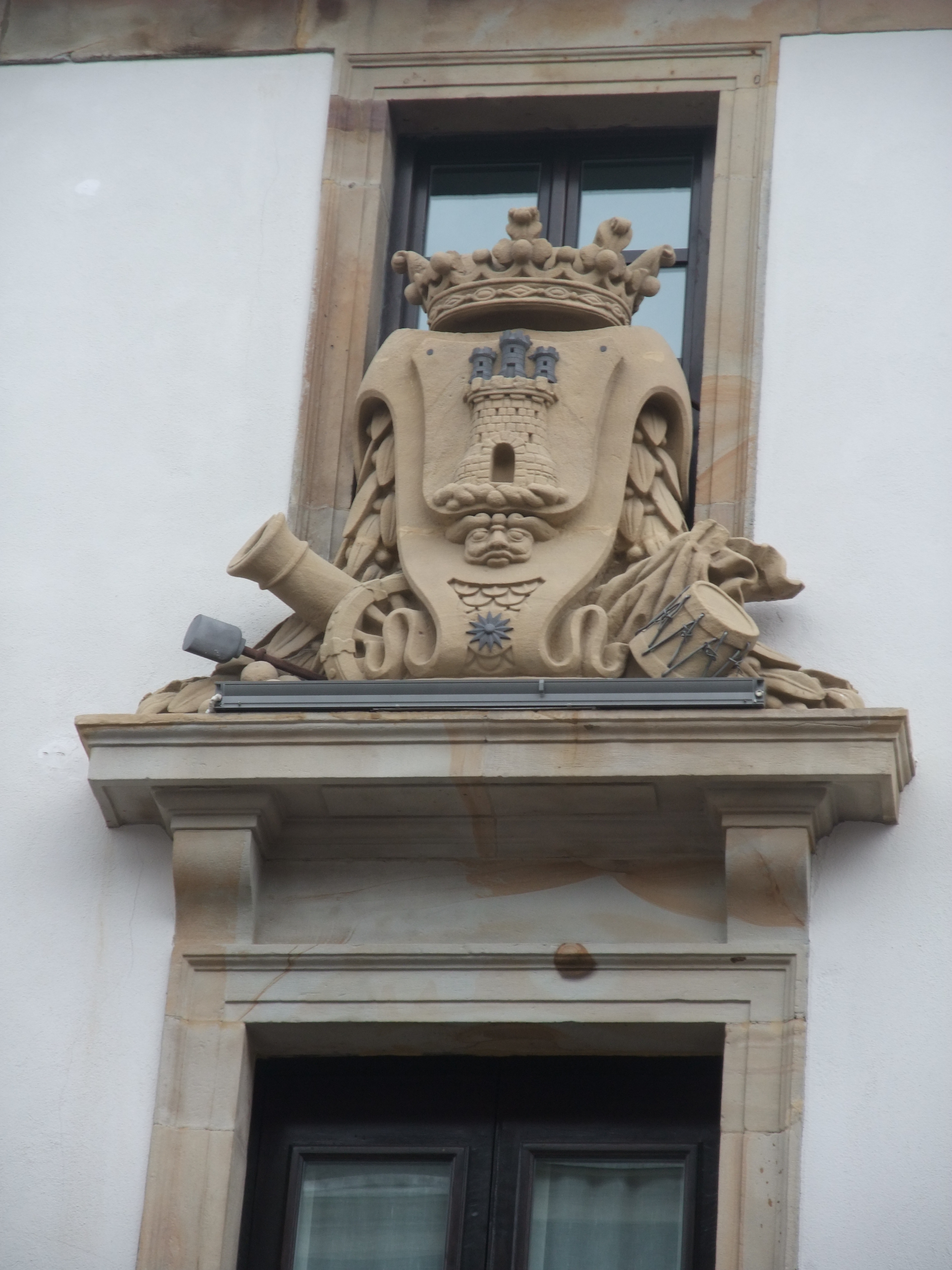 Ordizia (Guipúzcoa)-Ayuntamiento-2